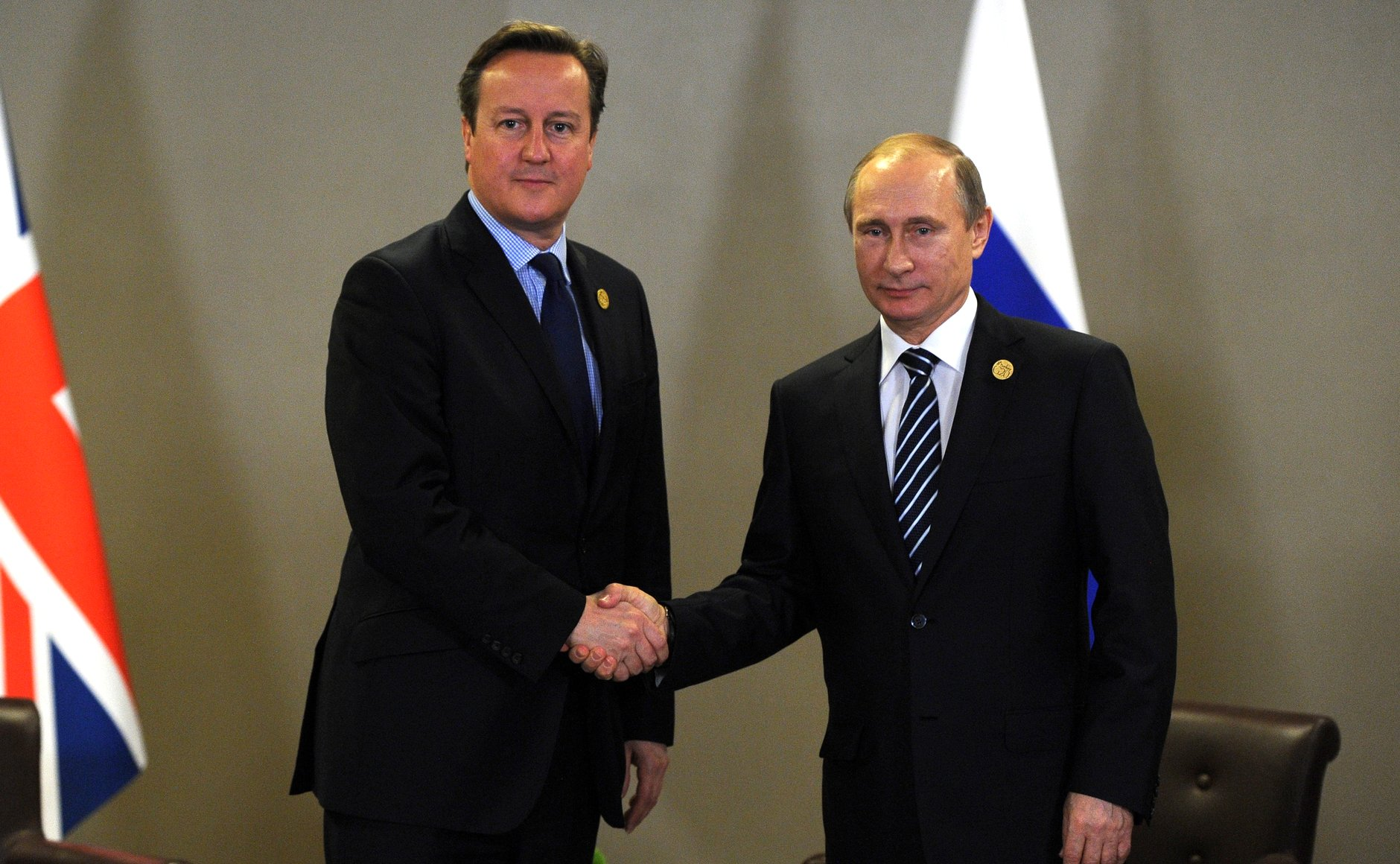 Встреча президента России Владимира Путина с Премьер-министром Великобритании Дэвидом Кэмероном